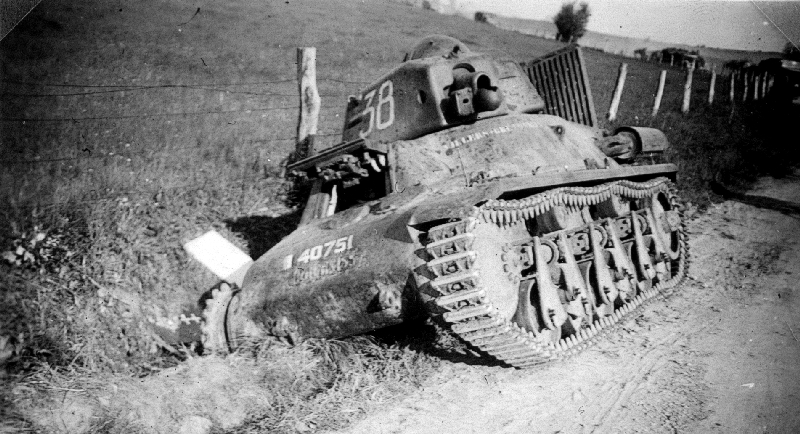 Verlassener französischer Panzer Hotchkiss H-35 (mod. 39) während des Westfeldzuges. Panzer "40751 VILLERS-COTTERETS", de:1er régiment de cuirassiers